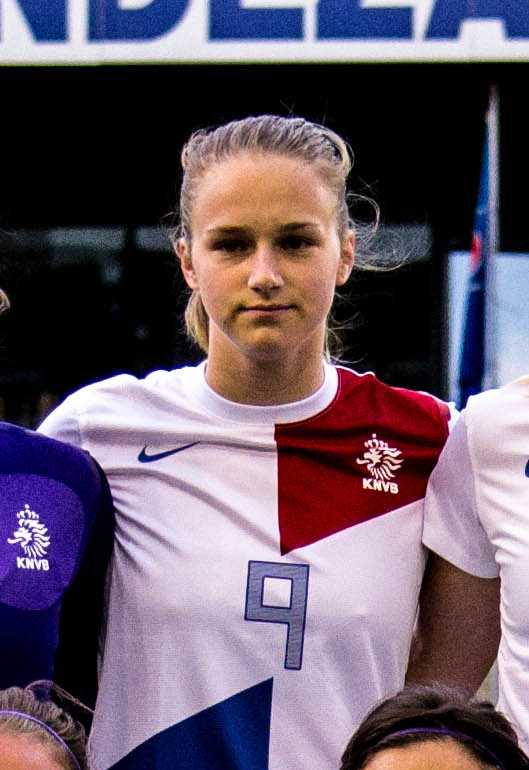 StampMedia